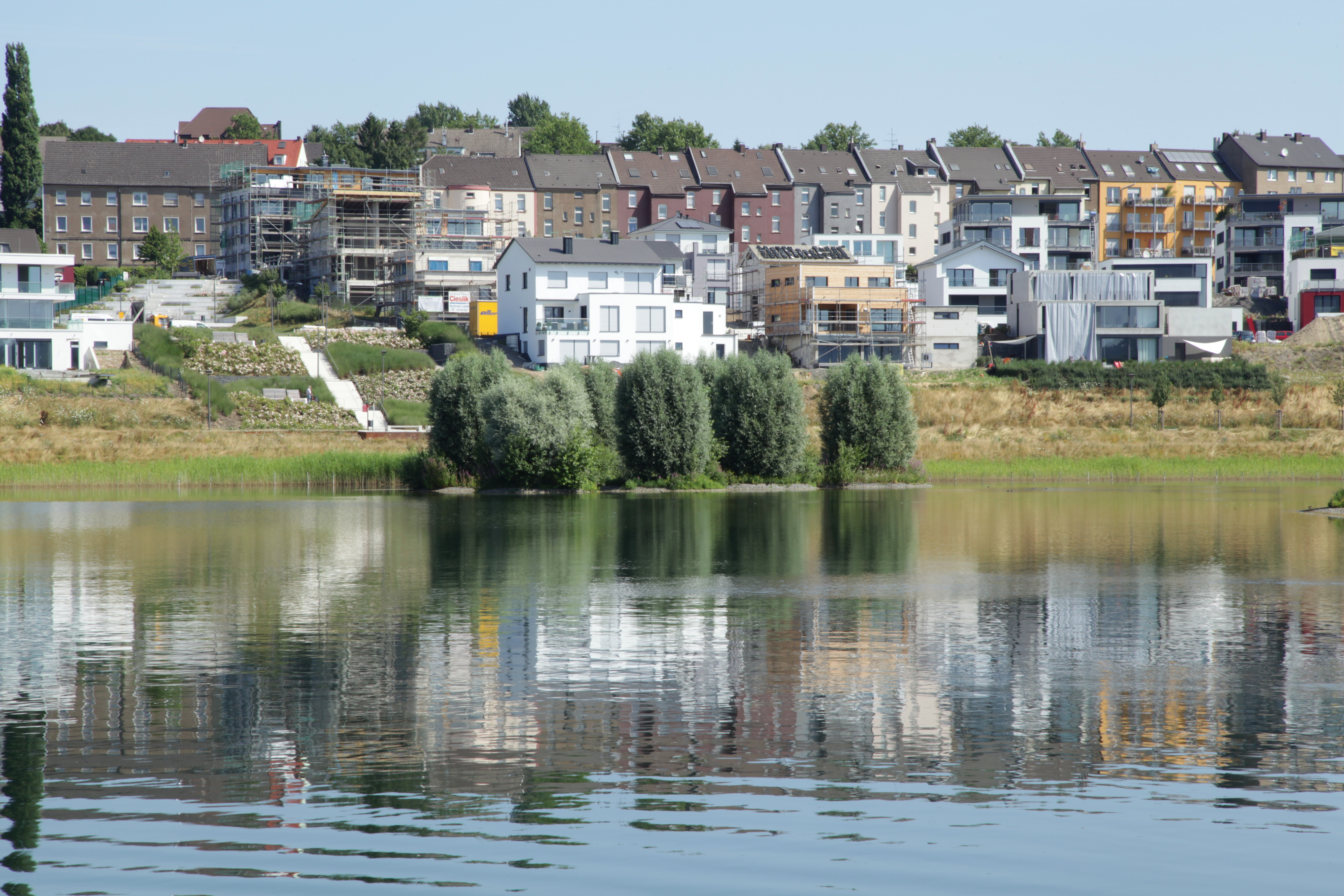 Blick von der Aussichtsplattform Phoenixseestraßeauf den Phoenix-See, dahinter An den Emscherauen, Seehöhe und Am Remberg in Dortmund